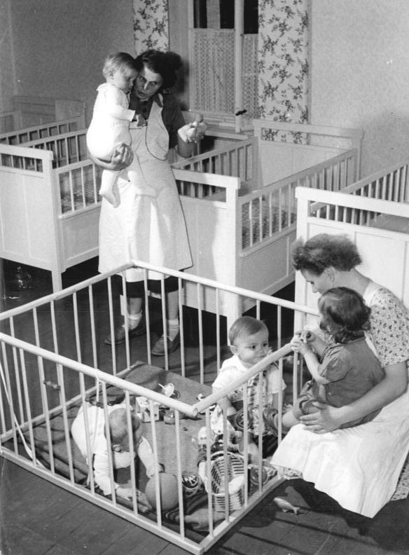 LPG Niedergoseln, Blick in die Kinderkrippe Zentralbild Weiß 25.8.1954 Kinderkrippe in der LPG Niedergoseln Gerade rechtzeitig zu Beginn der Ernte konnte die LPG "Vorwärts" in Niedergoseln, Kreis Oschatz, ihre Kinderkrippe eröffnen. So können die Muttis beruhigt ihrer Arbeit auf dem Felde nachgehen. UBz: Kinderpflegerin Frau Rüger und ihre Hilfe Kollegin Krumm (rechts) mit den Krippenkindern.